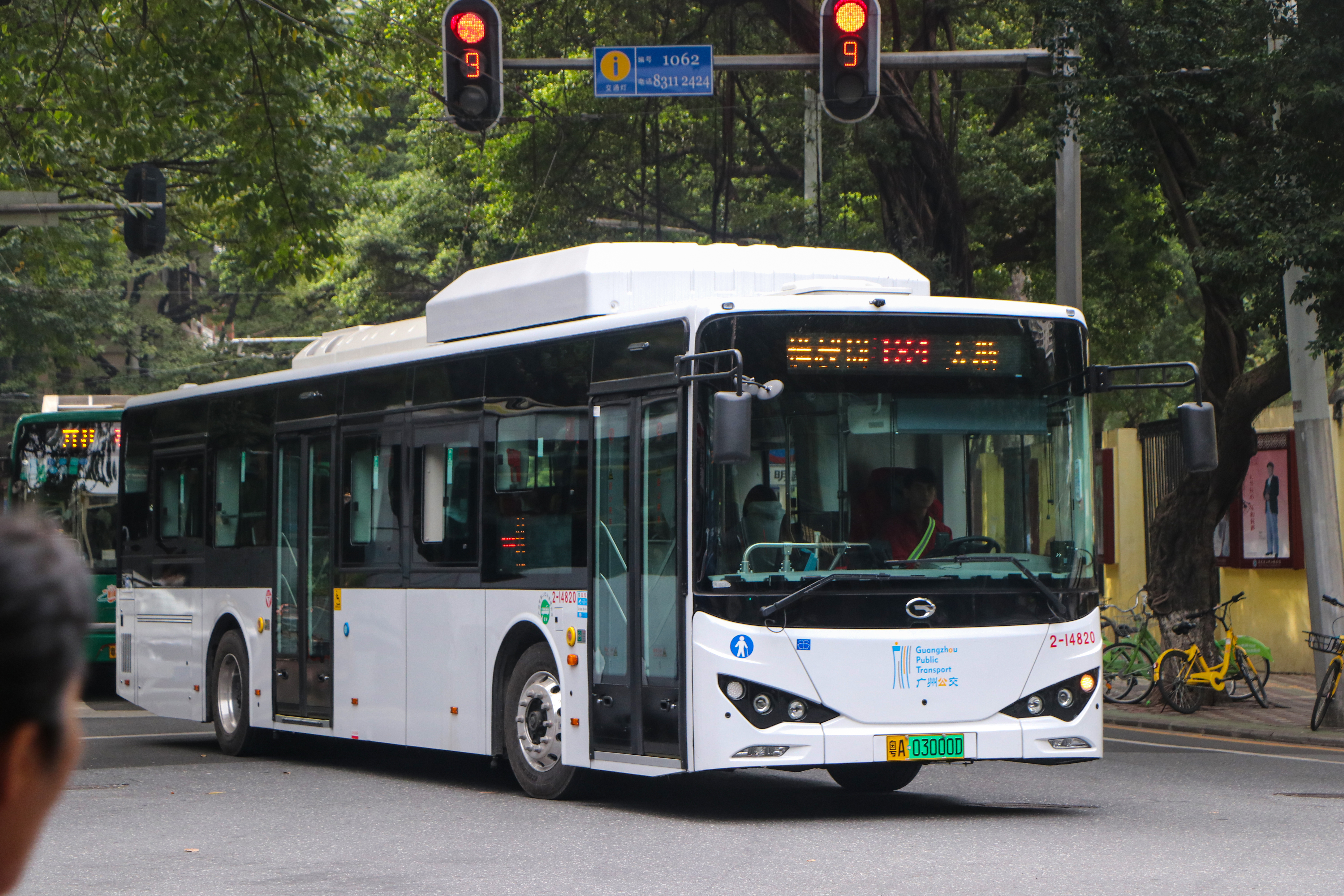 广州公交 184路